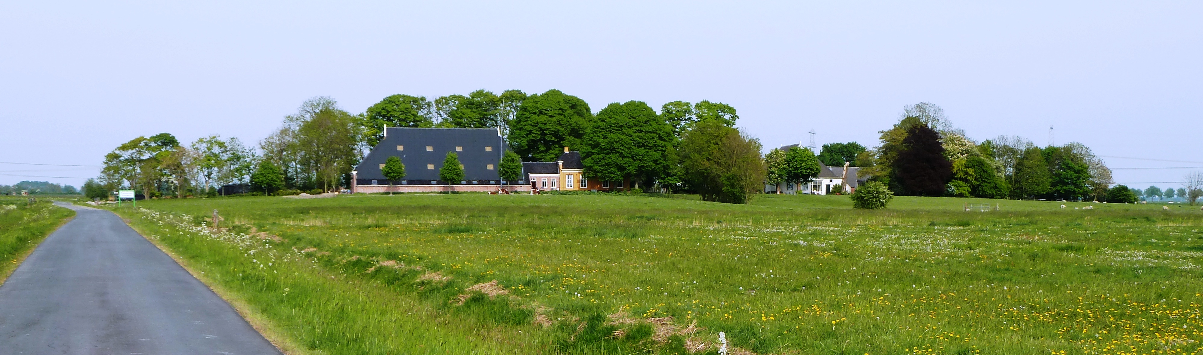 Panorama over de wierde van het Fransumer Voorwerk (Zuidhorn, Groningen, Nederland)